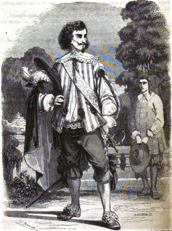 Portrait de D'Artagnan.